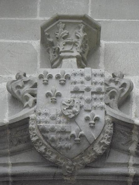 Transept sud de l'église Notre-Dame de Vitré (35). Détail du blason de Guy XV de Laval, baron de Vitré, au dessus de la Porte du Haut, à l’entrée du transept sud de l’église Notre-Dame de Vitré (Ille-et-Vilaine). Blasonnement: écartelé au I d'azur à trois fleurs de lys d'or, au II et III d'or à la croix de gueules cantonnée de seize alérions d'azur ordonnés 2 et 2 et chargée de cinq coquilles d'argent, au IV d'azur à trois fleurs de lys d'or chargé d'un bande camponnée de gueules et d'argent, sur le tout de gueules au lion d'argent.